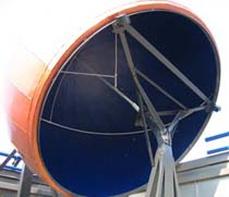 Der Hohlglobus der Sternwarte Heilbronn